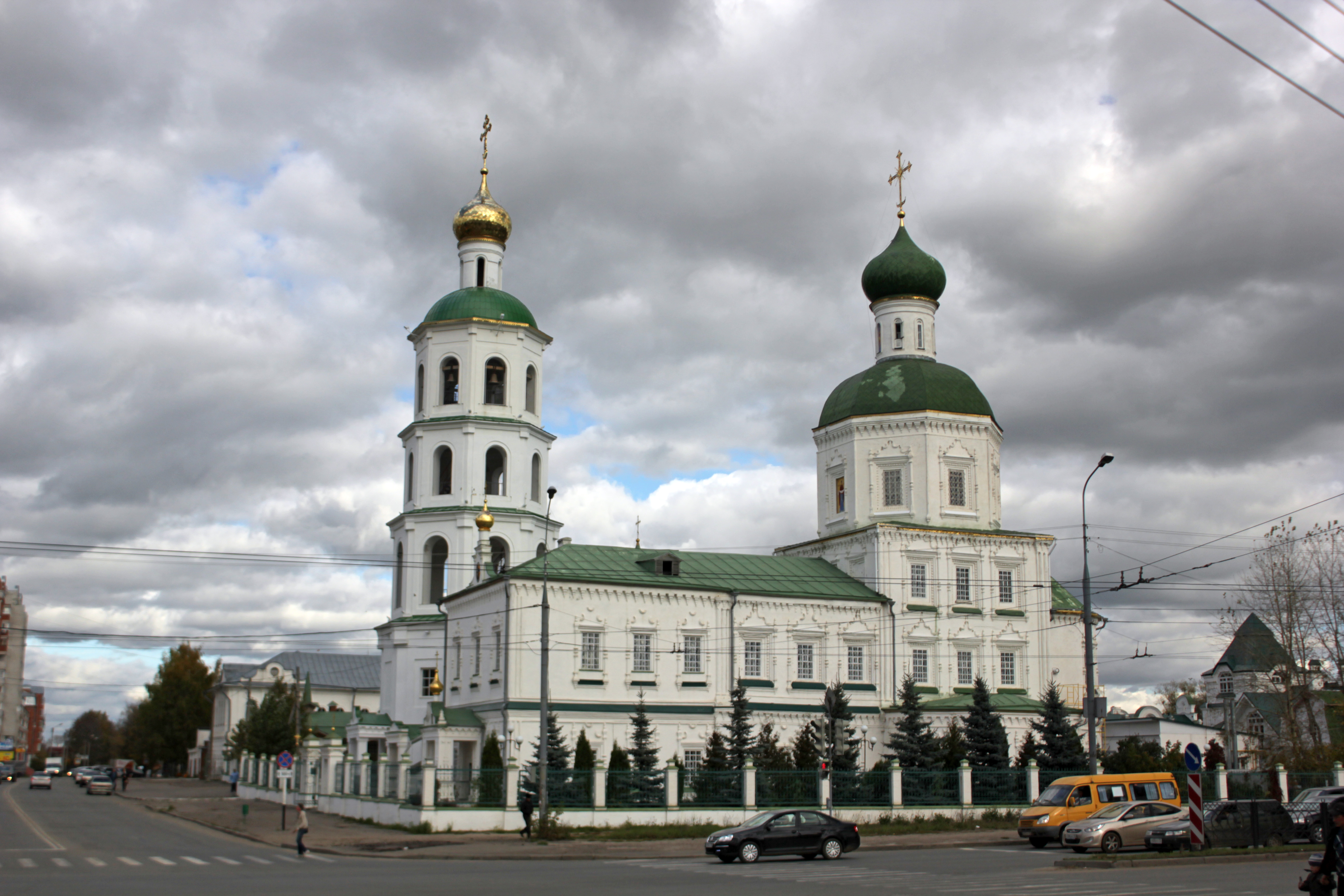 1756г.